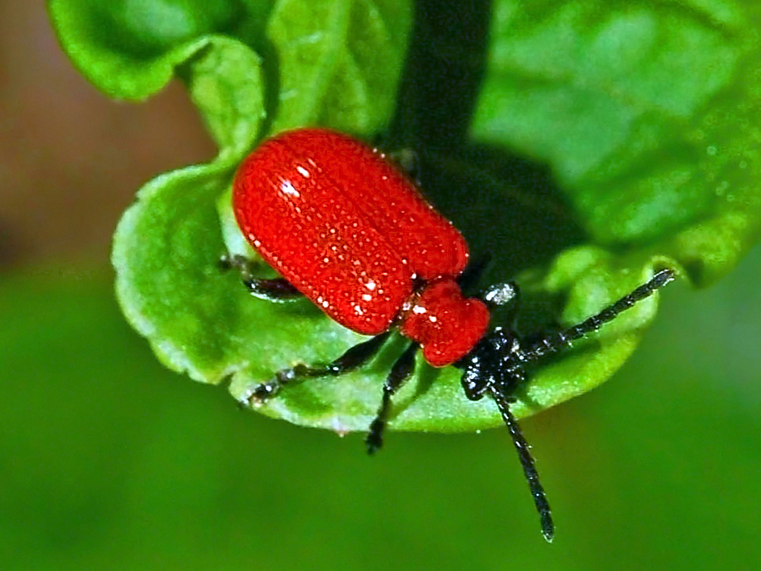 Chrysomelidae - "Lilioceris lilii". Genova, Italy